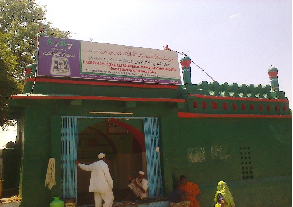 షా అలీ పహిల్వాన్ దర్గా